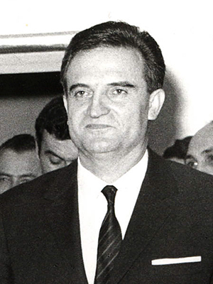 Srpski (latinica): Inventarski broj:1969 393 031